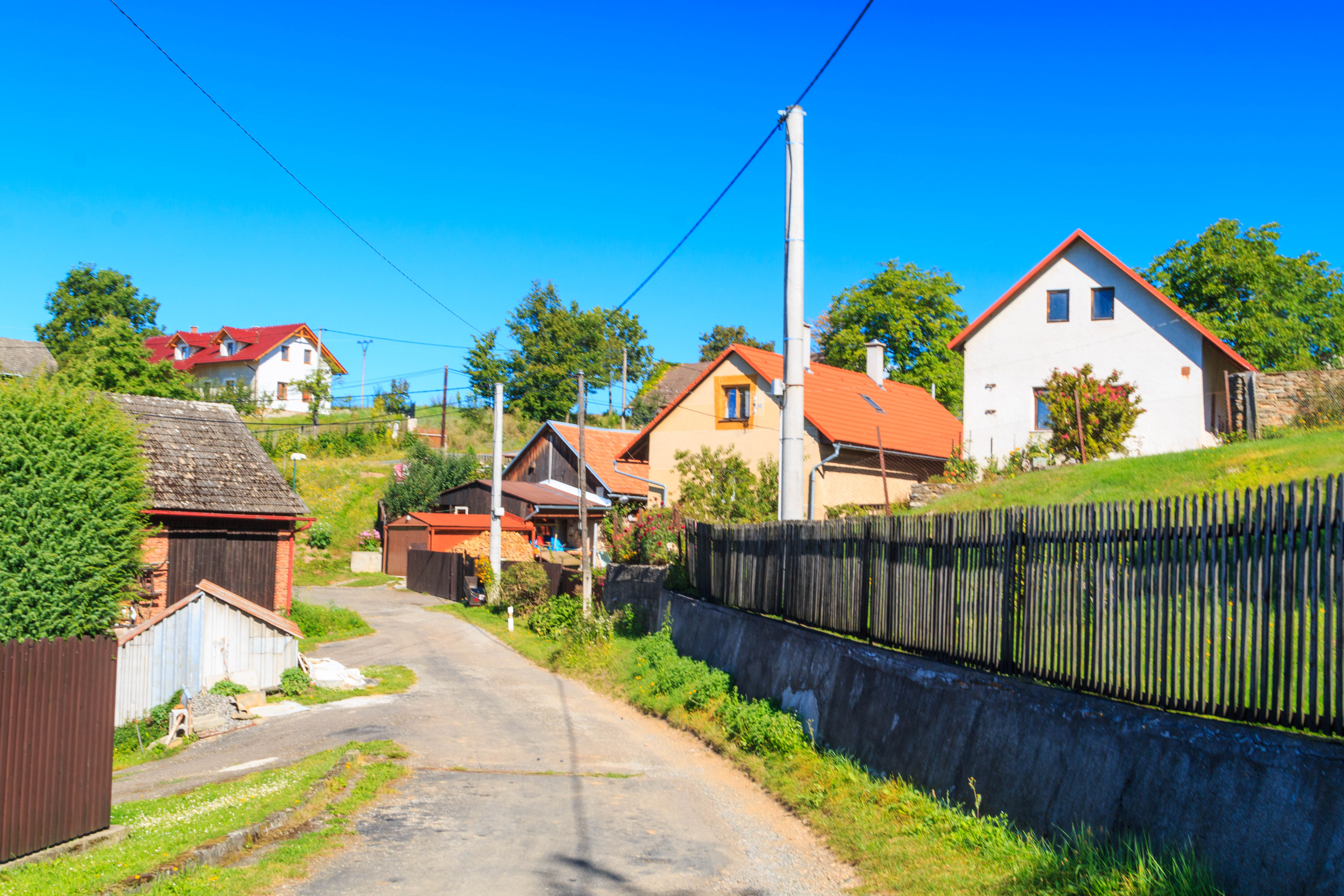 Volavá Lhota - čp. 13